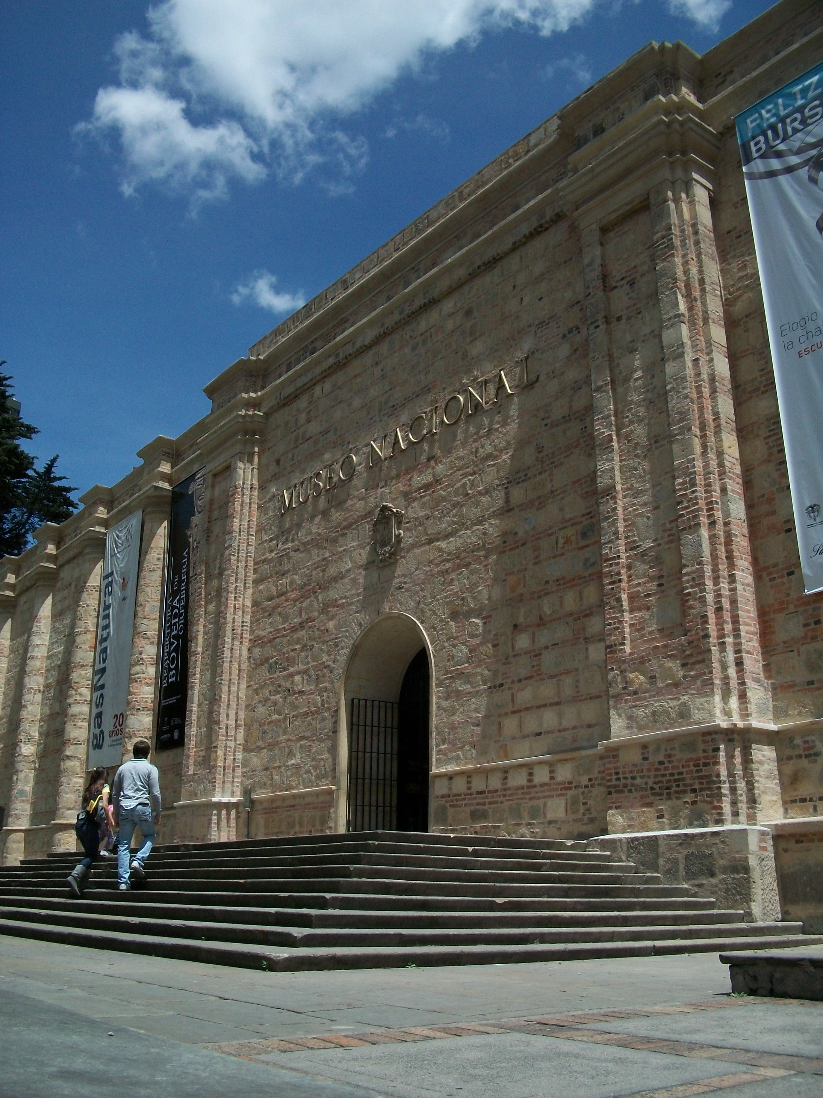 Fachada del Museo Nacional de Bogotá tras los trabajos de restauración